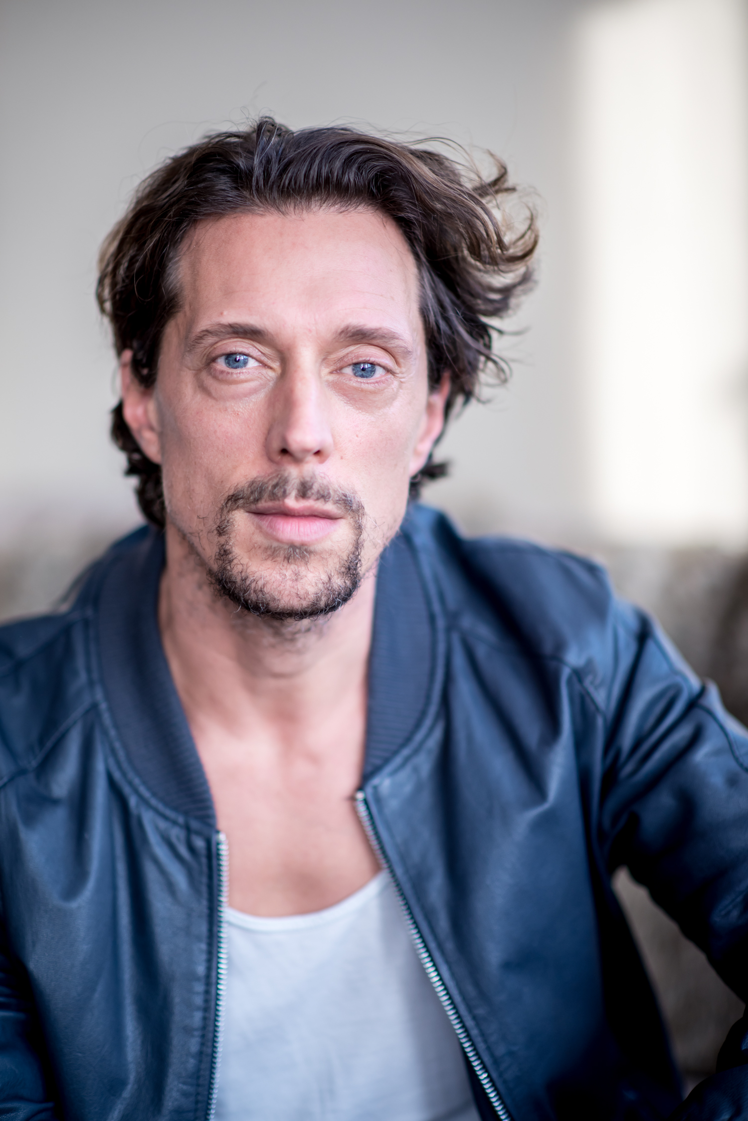 Michael Pink